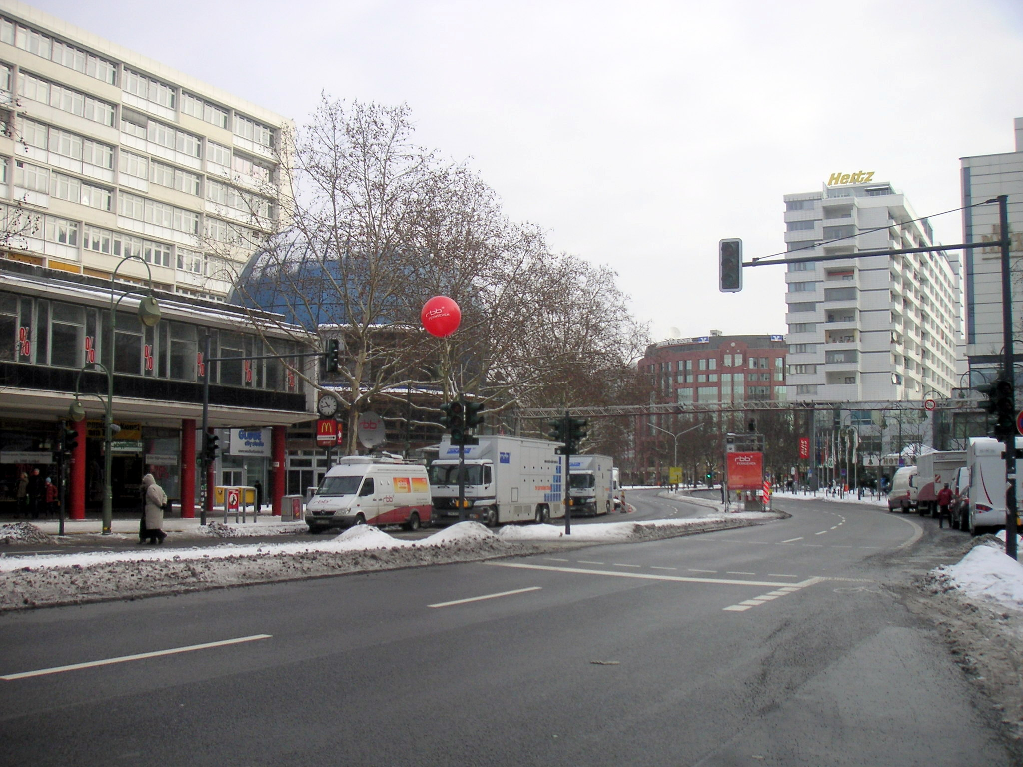 Berlin-Charlottenburg Budapester Straße Blaue Kugel